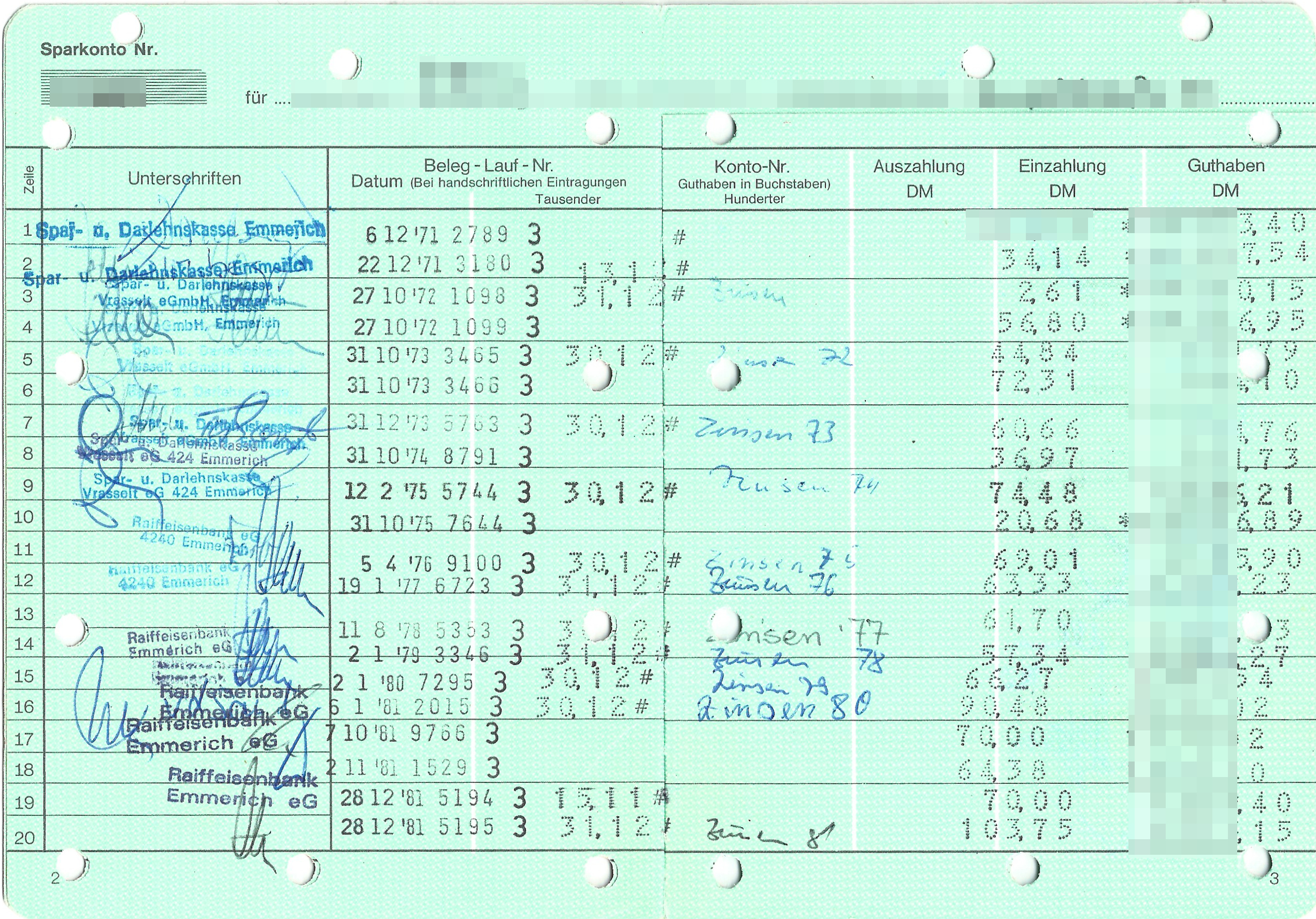 Sparbuch der Spar- und Darlehenskasse Vrasselt, Emmerich (später umbenannt in Raiffeisenbank Emmerich). Seite 2 und 3 mit den Ein- und Auszahlungen sowie den Zinszahlungen